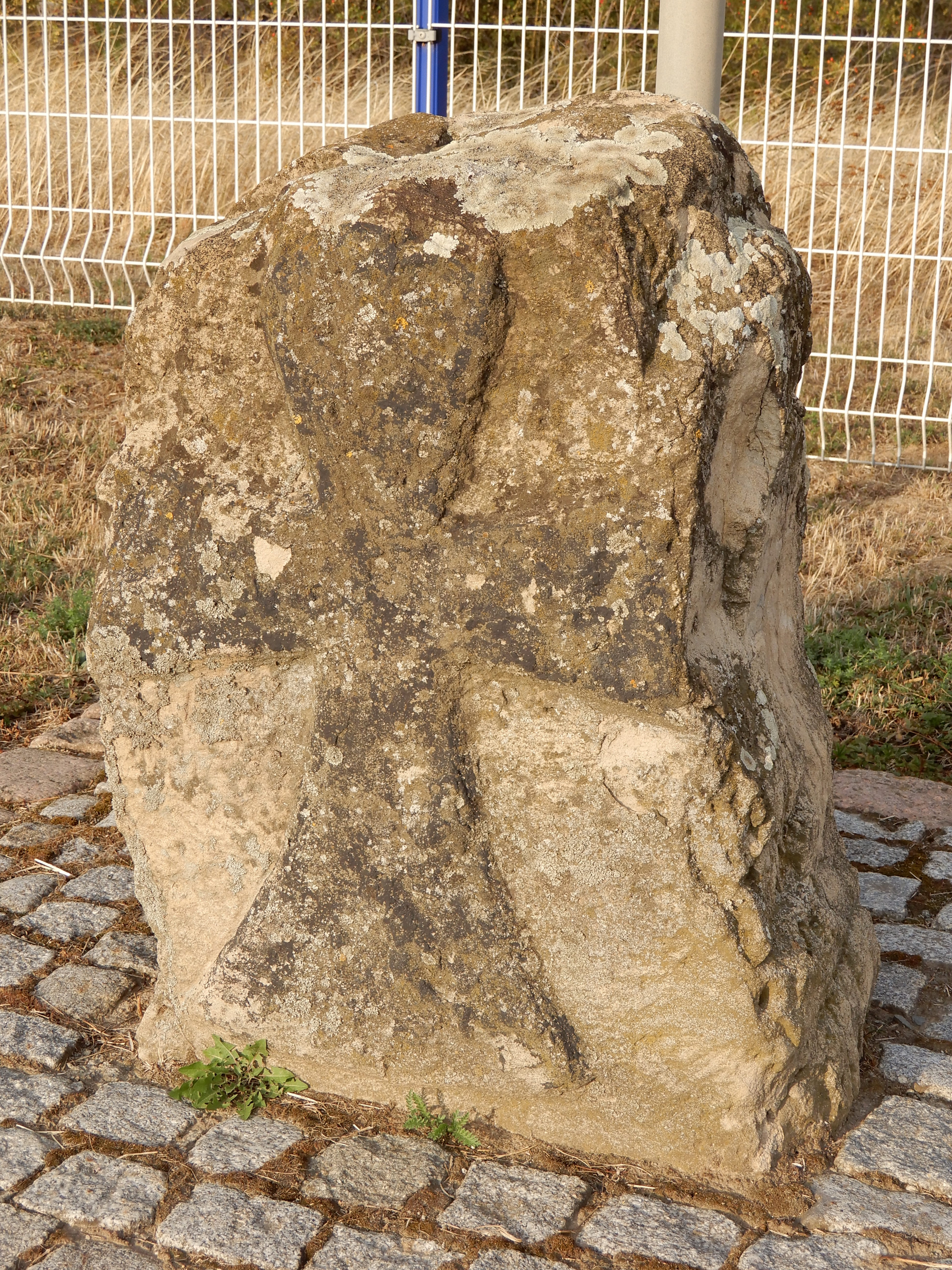 Das „Warnstedter Mordkreuz“ soll an Siegfried I. Pfalzgraf bei Rhein erinnern, der hier am 21. Februar 1113 bei der Schlacht bei Warnstedt durch Anhänger des kaiserlichen Feldmarschalls Hoyer von Mansfeld verwundet wurde und am 9. März 1113 starb. Der Stein soll erst im 15. Jahrhundert aufgestellt worden sein.